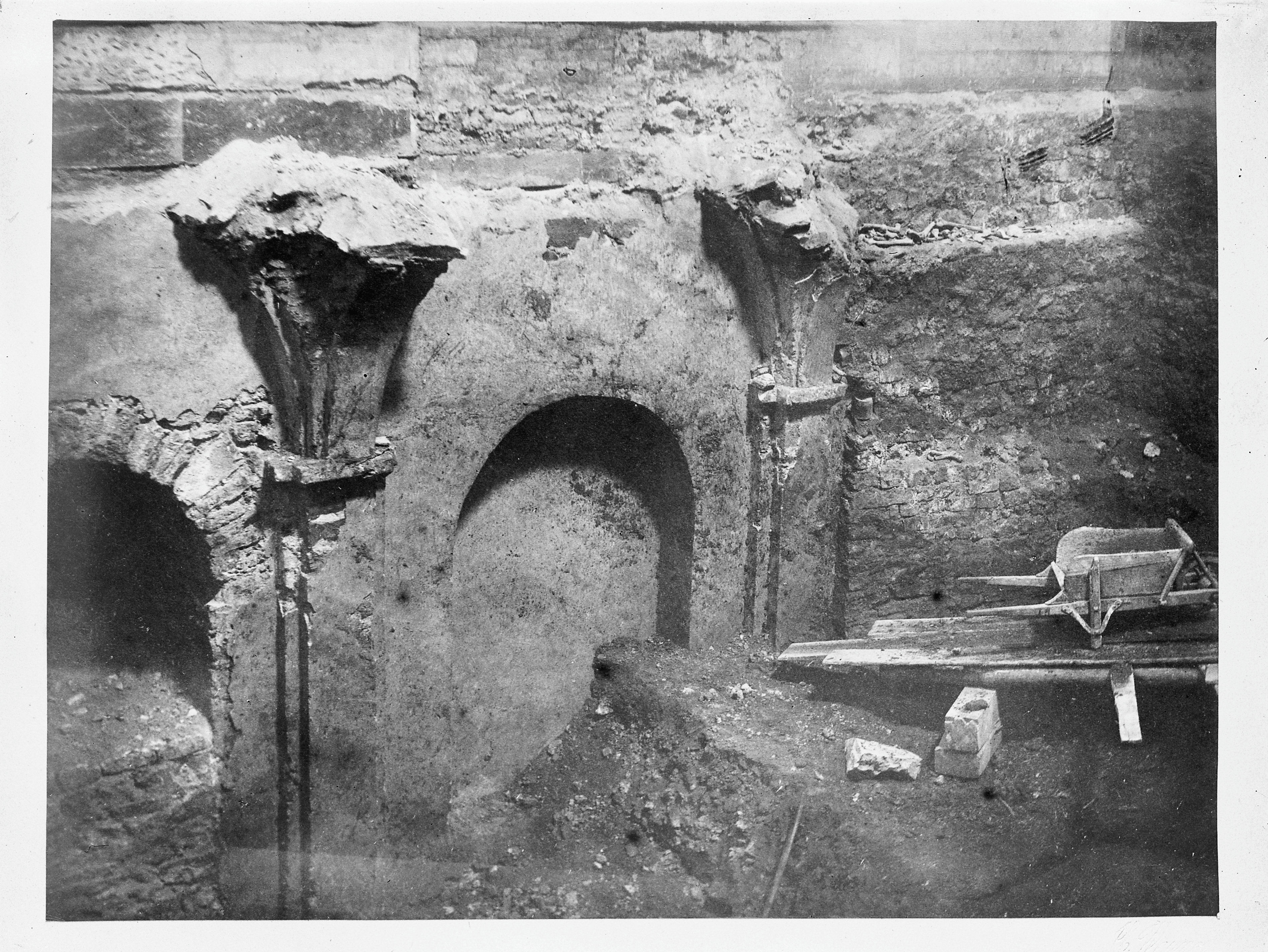 Sint Servaaskerk: Interieur oostelijke crypte gezien naar het noorden (opmerking: Repro van foto uit 1881 van onbekende fotograaf)